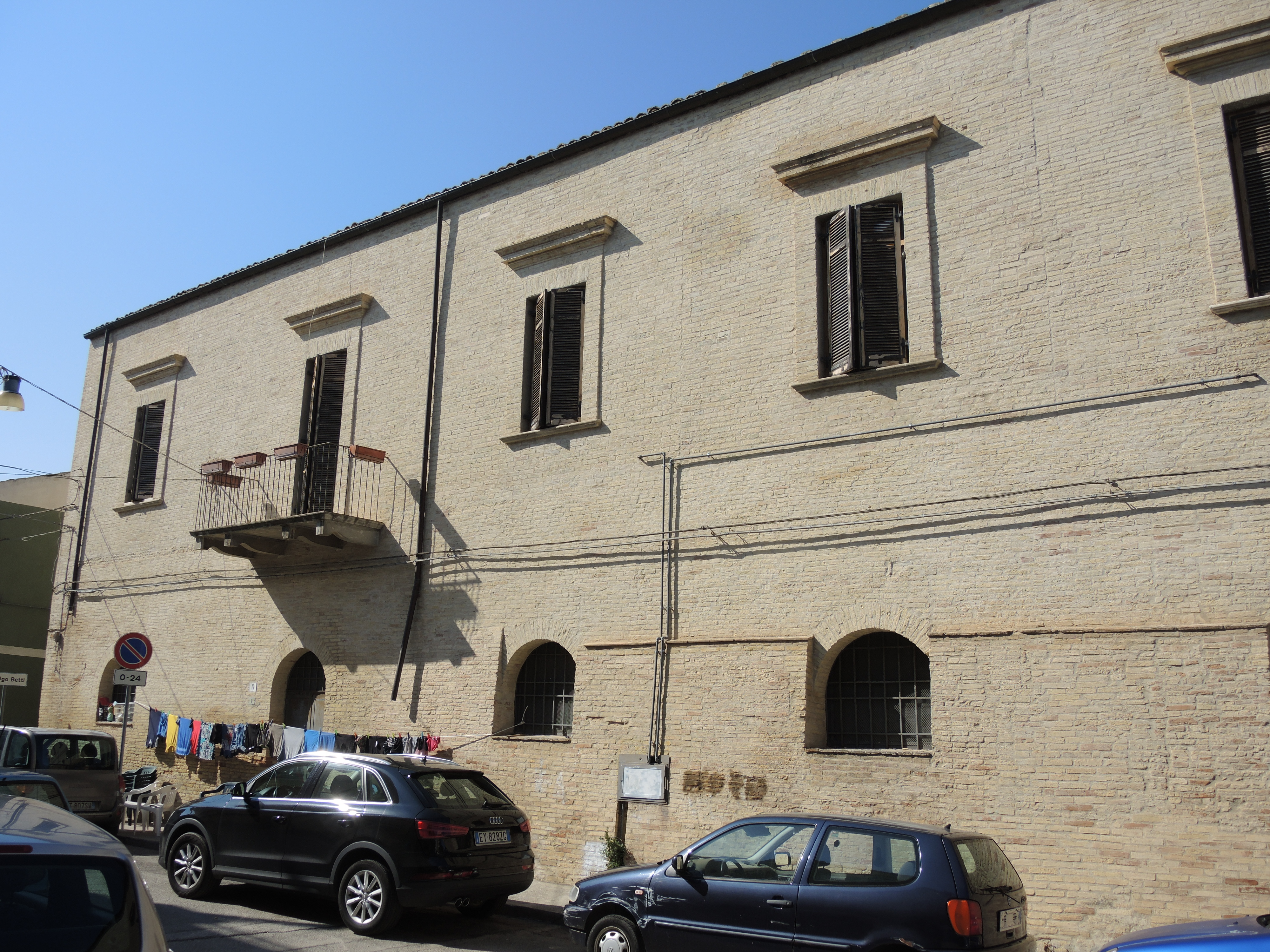 Palazzo Aragona This is a photo of a monument which is part of cultural heritage of Italy.